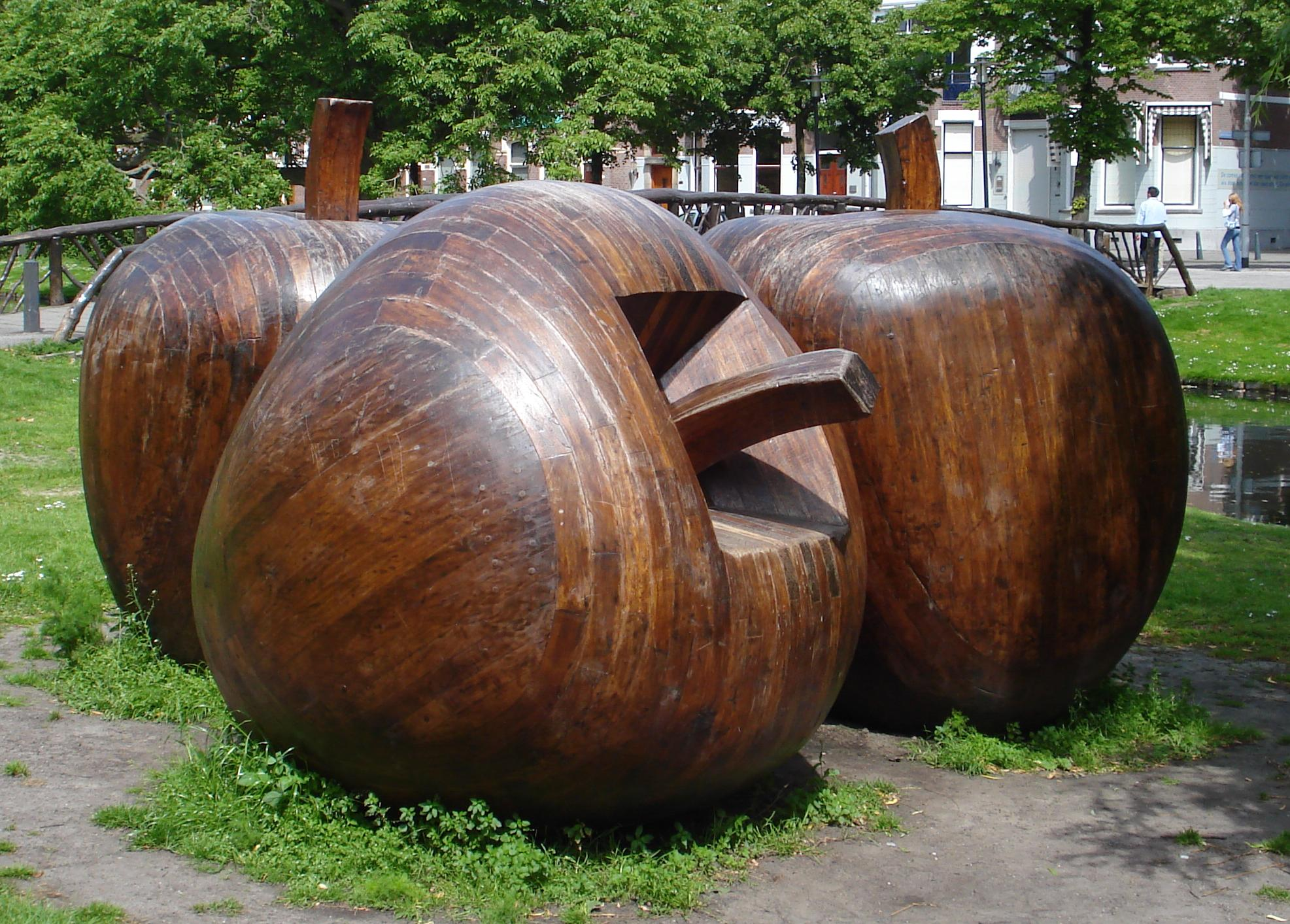 Rotterdam, Heemraadssingel. Kunstwerk "Appels" van Kees Franse. Rotterdam/The Netherlands.